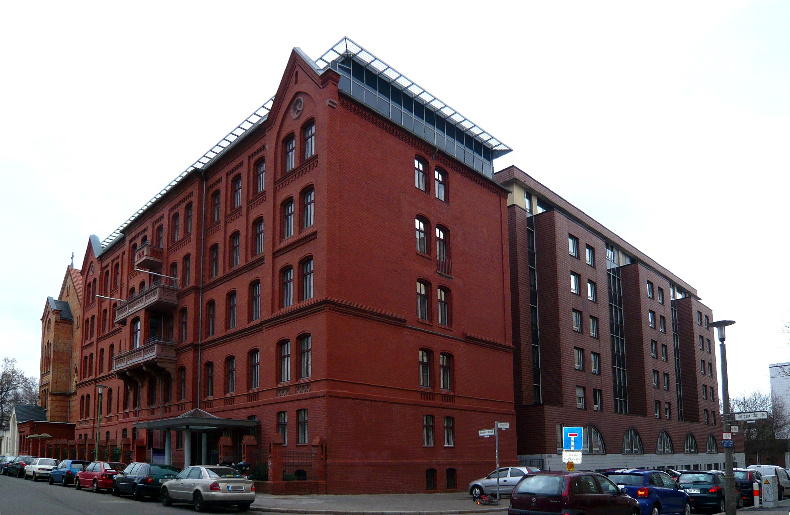 Ortsteil Friedrichshain: Georgenkirchstraße, ev. Zentrum Ecke Höchste Straße